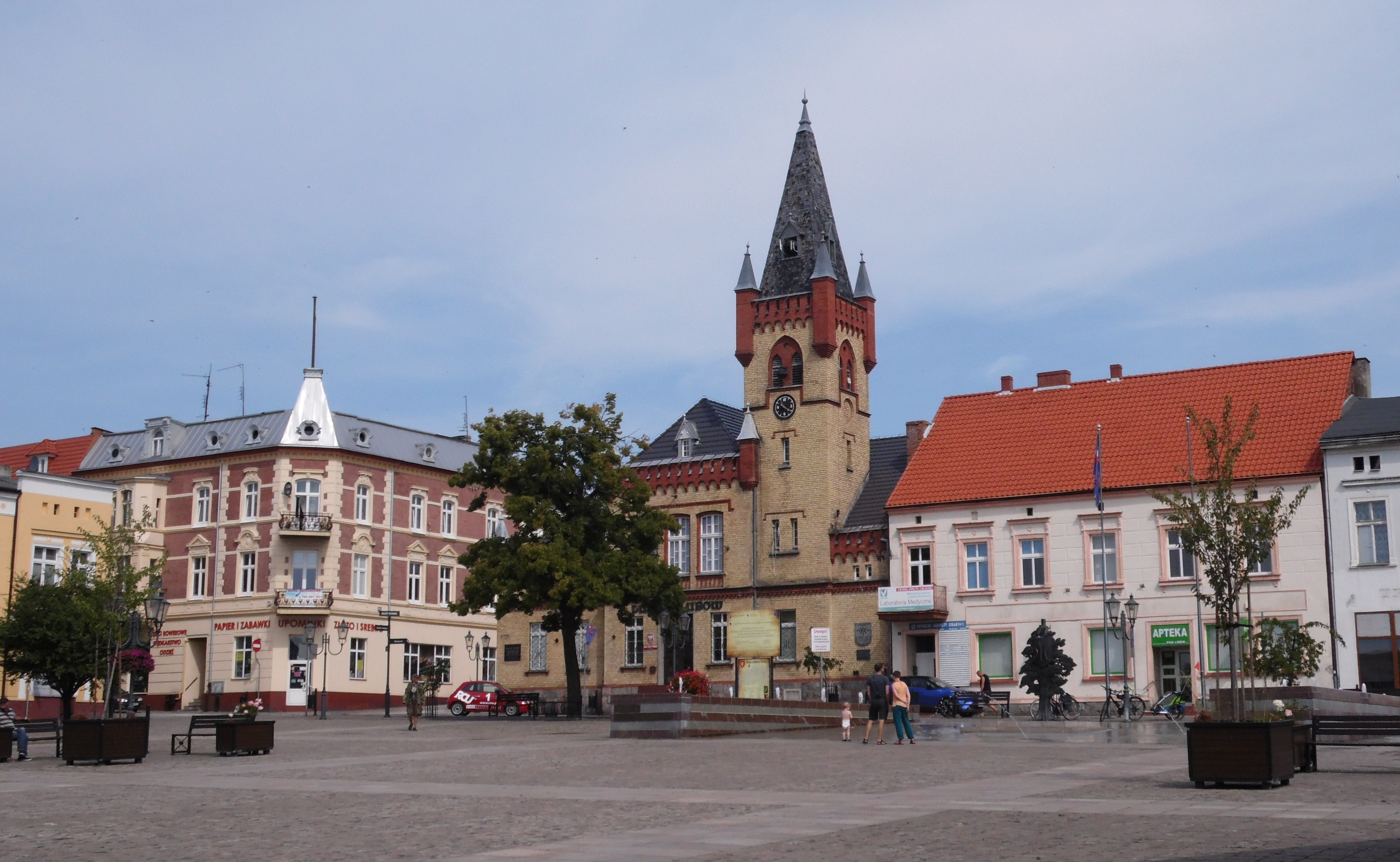 Rynek Starego Miasta z widokiem na Ratusz.